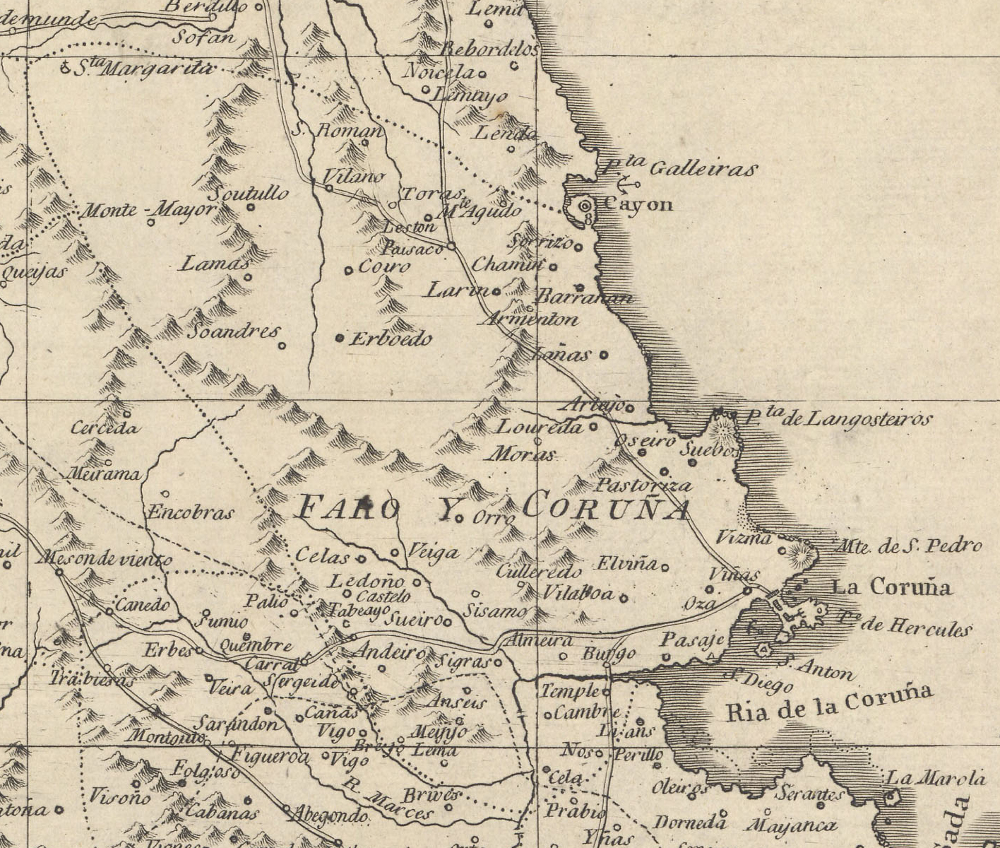 Arciprestado de Faro no mapa do arcebispado de Santiago de Compostela realizado por Angel Marin, cura de S. Salvador de Poio.